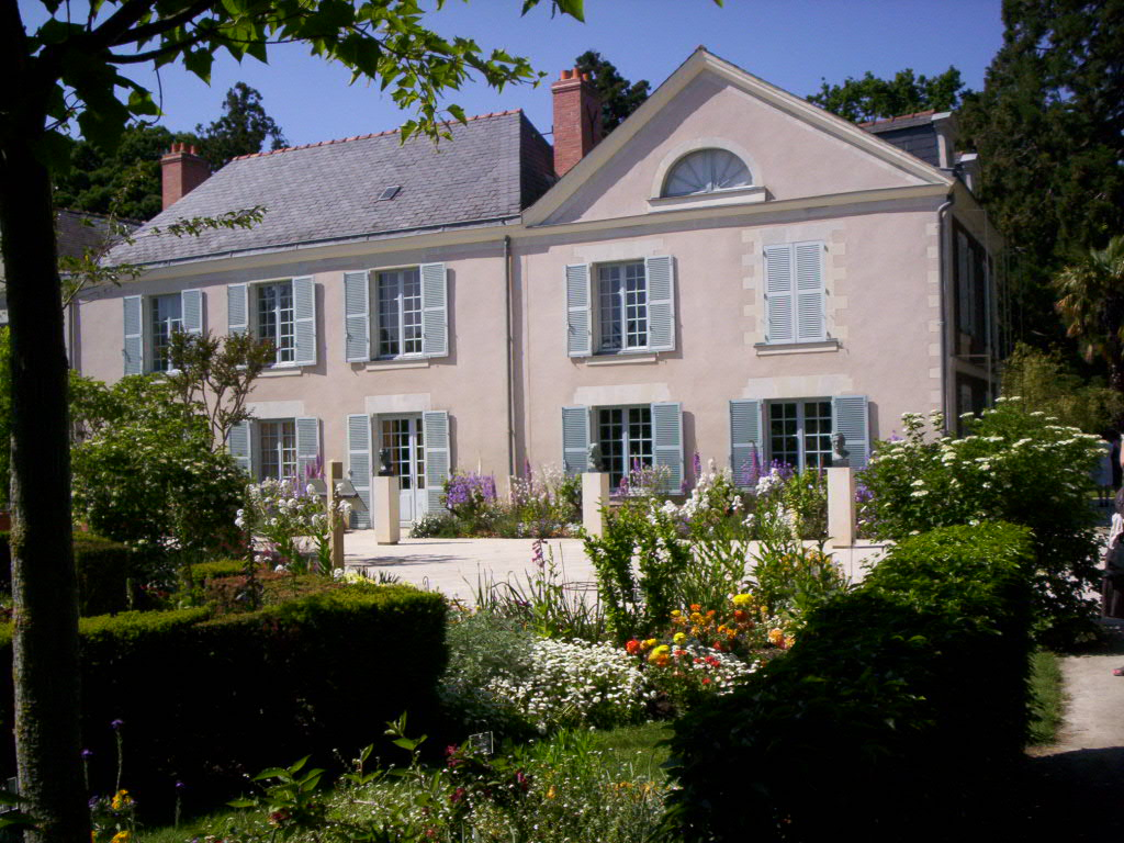 La Maison familiale Les Maulevries de Gaston Allard abritant le musée Cacheux dans l'Arboretum Gaston Allard à Angers